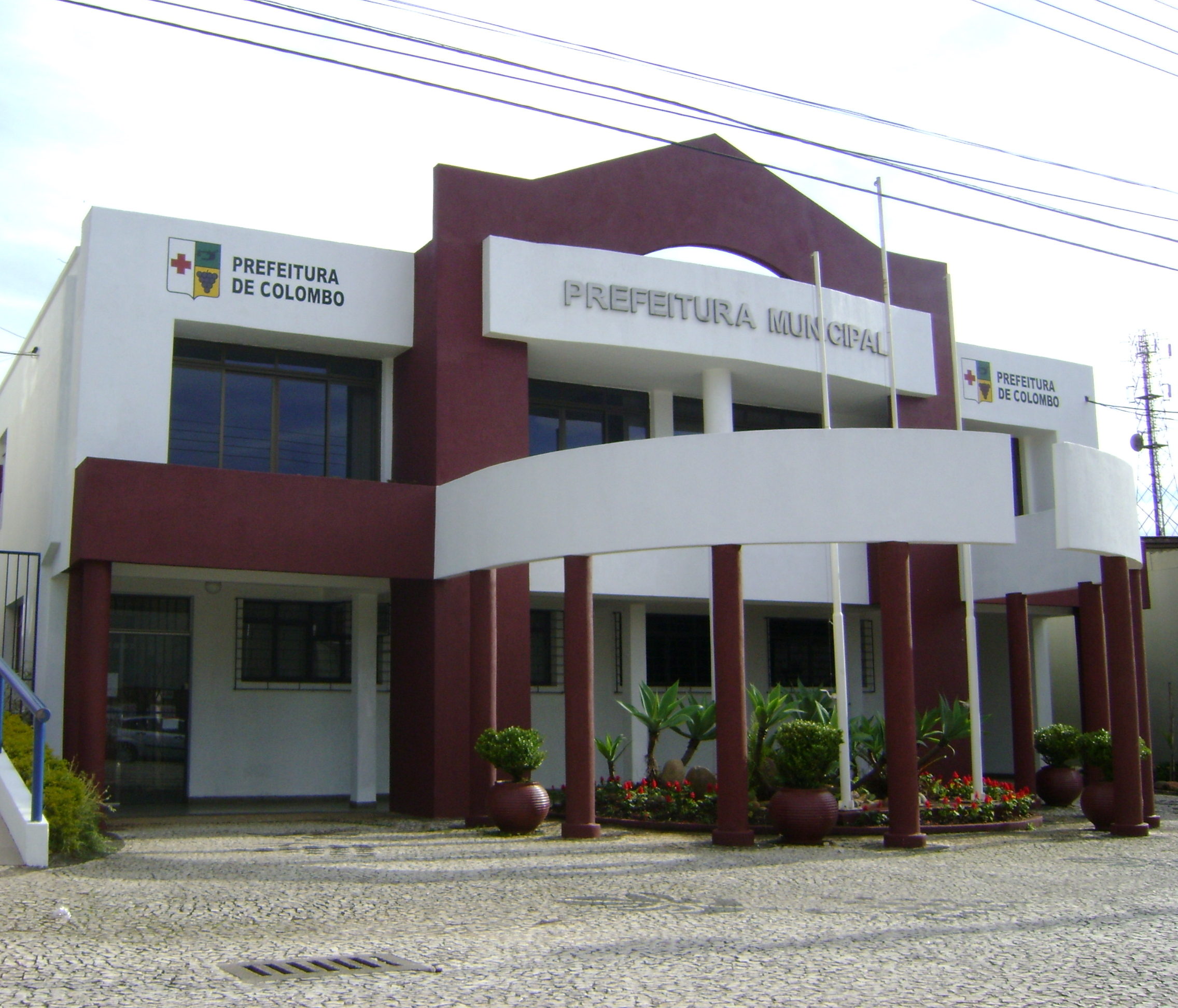 Prédio da Prefeitura de Colombo, município paranaense da Grande Curitiba.